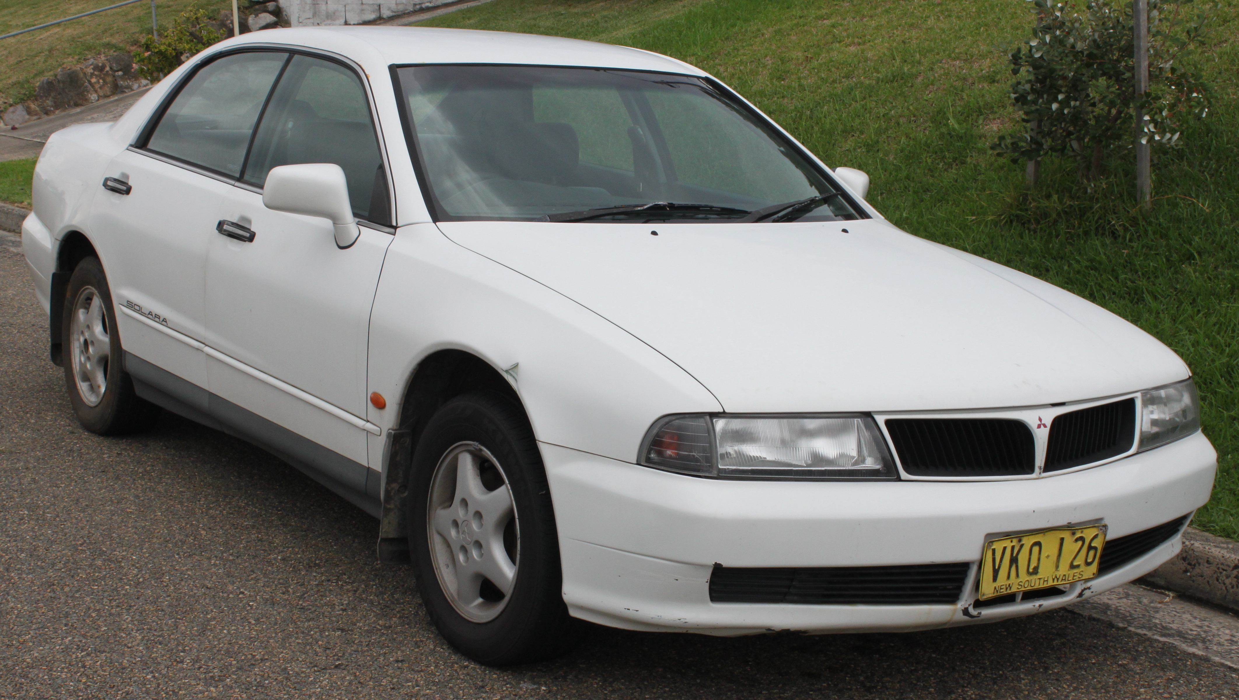 Mitsubishi Magna TF Solara